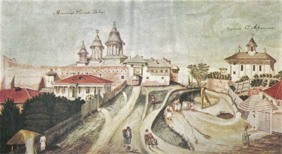 aquarelle, Radu Vodă neighborhood